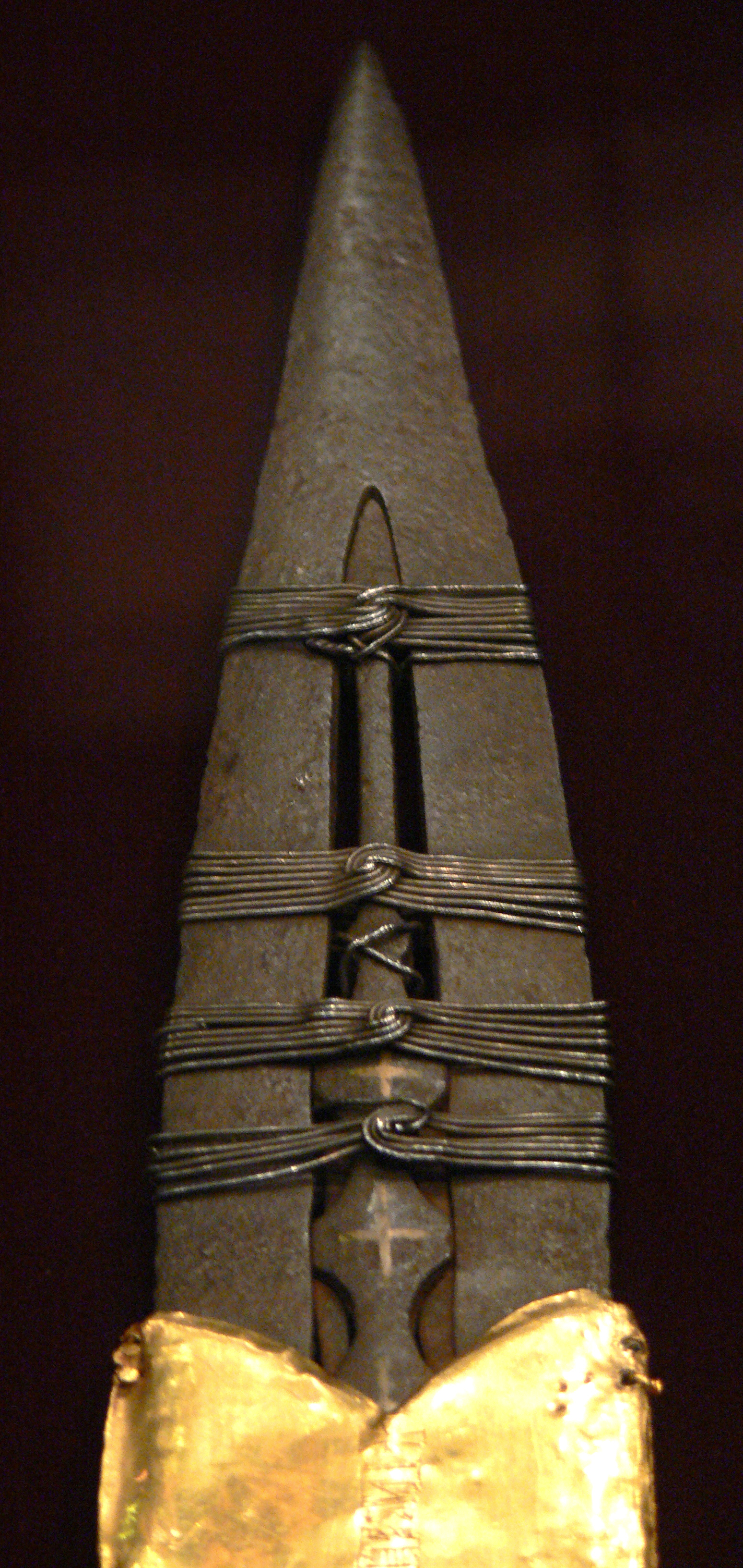 Heilige Lanze, Detail; Wien, Weltliche Schatzkammer, Inv.-Nr. SK XIII 19